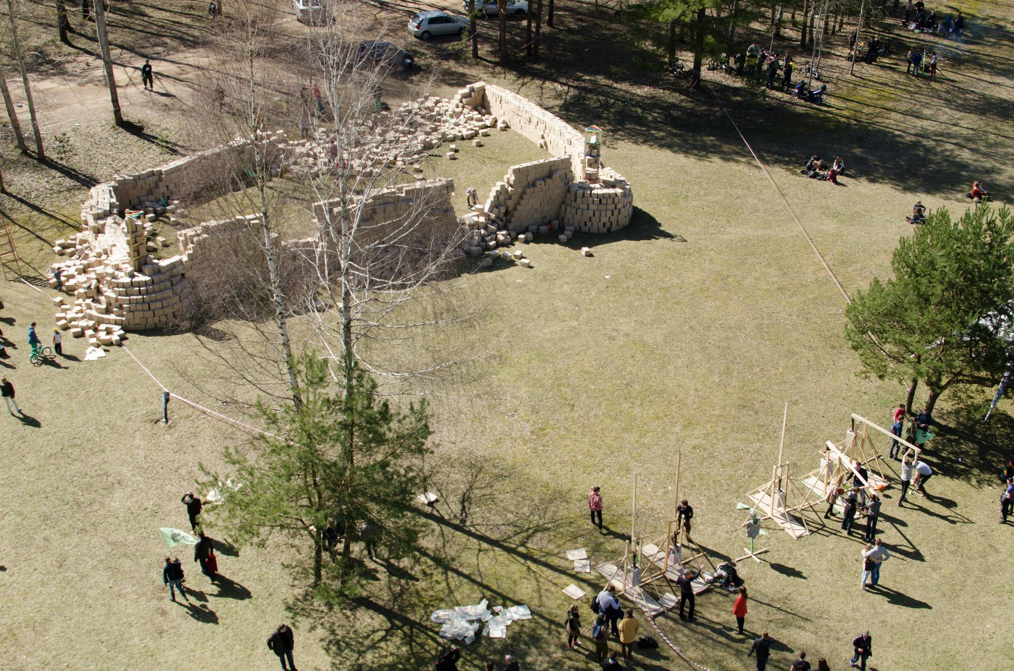 FiDi 47